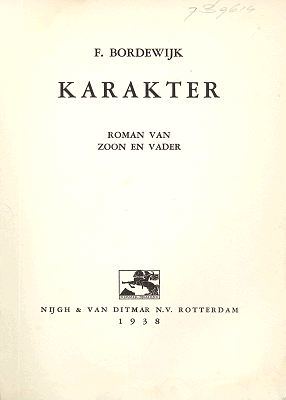 Omslag van de editie 1938 van het boek Karakter van F. Bordewijk